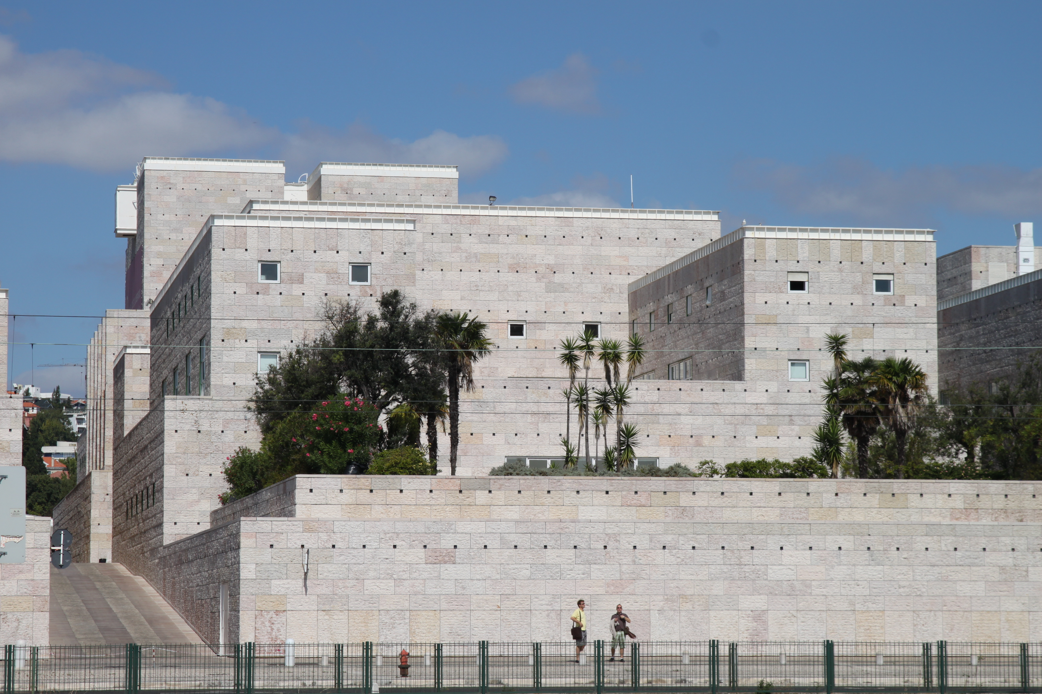 Centro Cultural de Belém This file was uploaded for Wiki Loves Monuments in Portugal with the unique identifier 72418.